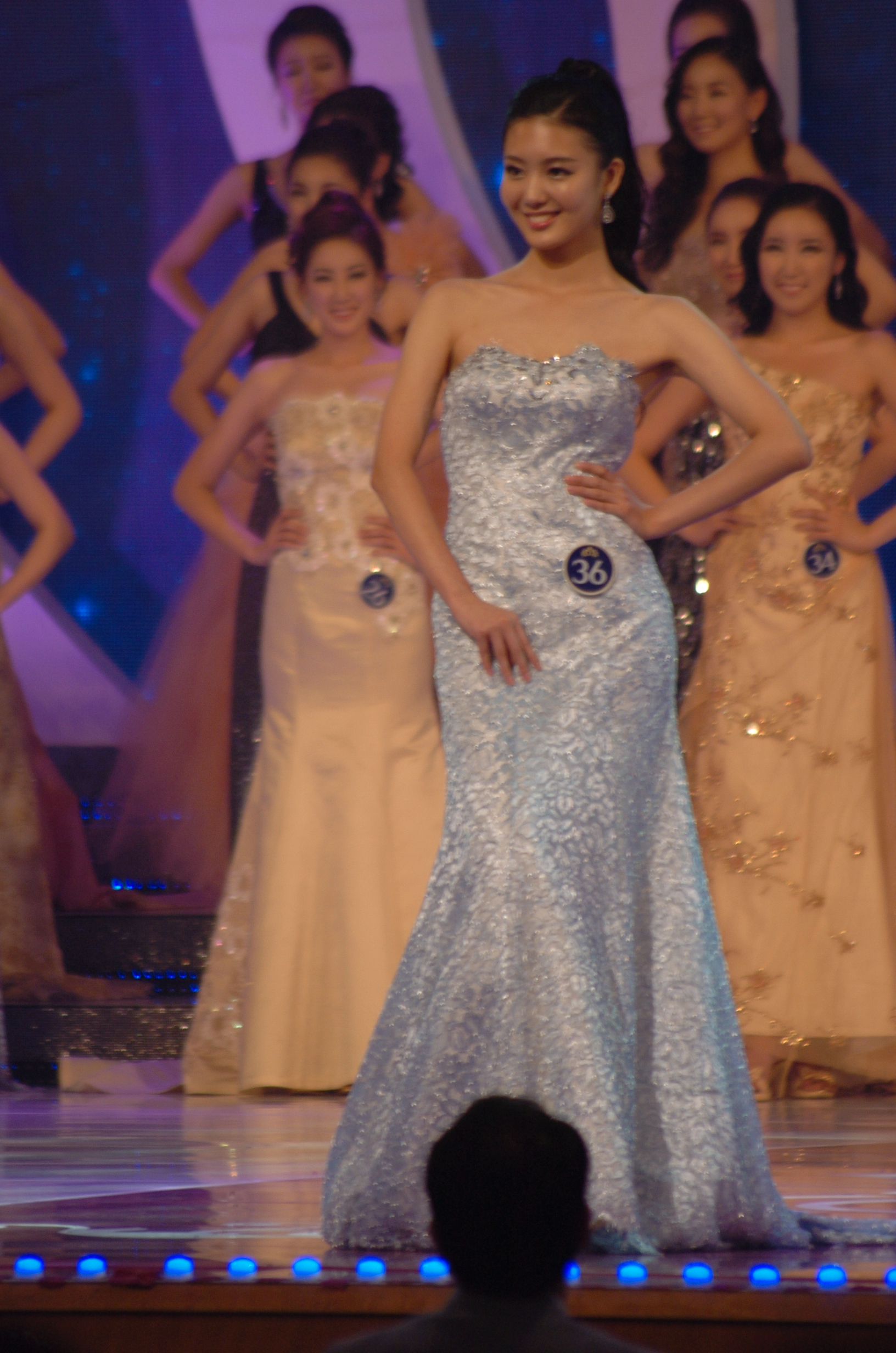 2012 미스코리아 선 이정빈(광주·전남 진) 드레스 심사